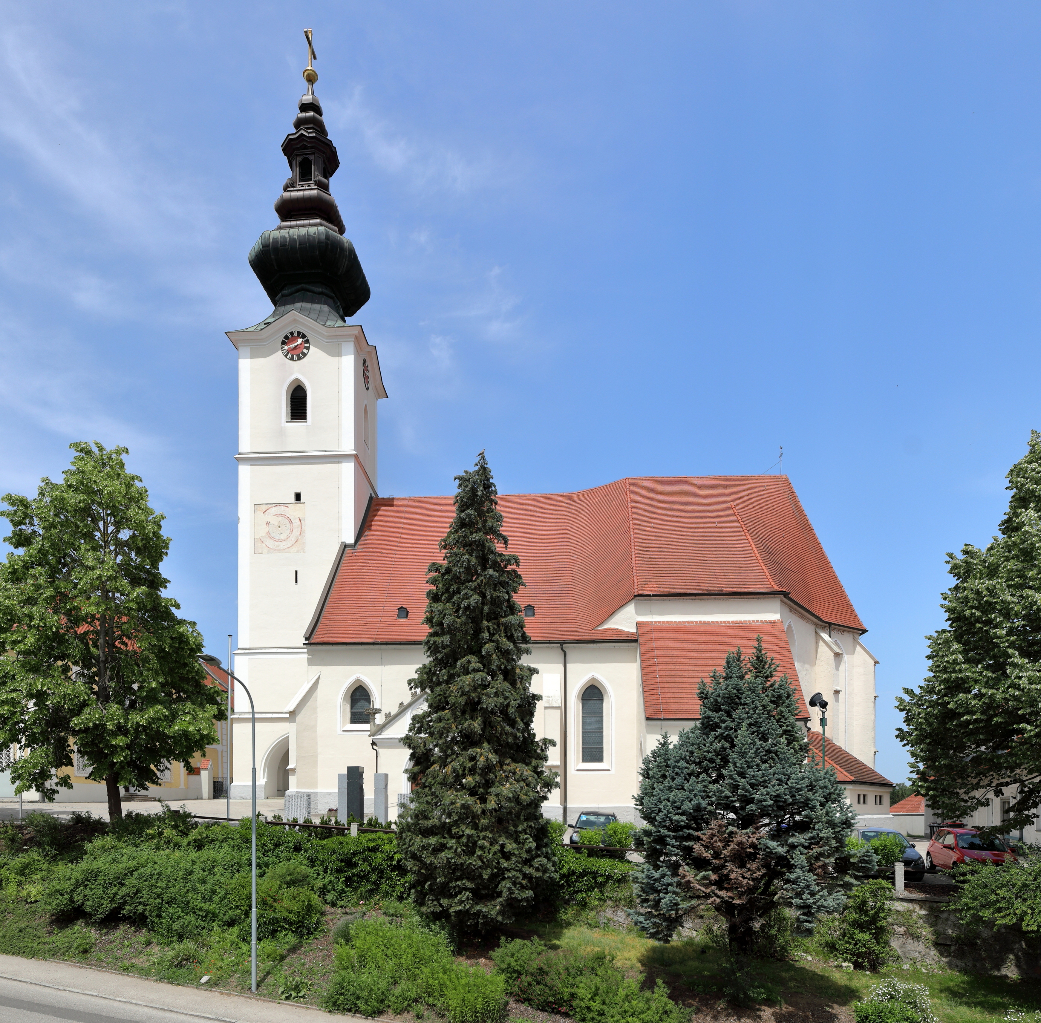 Südansicht der röm.-kath. Pfarrkirche hl. Martin in der niederösterreichischen Marktgemeinde Aschbach-Markt. Eine spätgotische Staffelkirche aus dem 15./16. Jahrhundert, wobei der vorgestellte Westturm 1833 erhöht wurde und eine vierfache Zwiebelhaube mit Laterne erhielt.